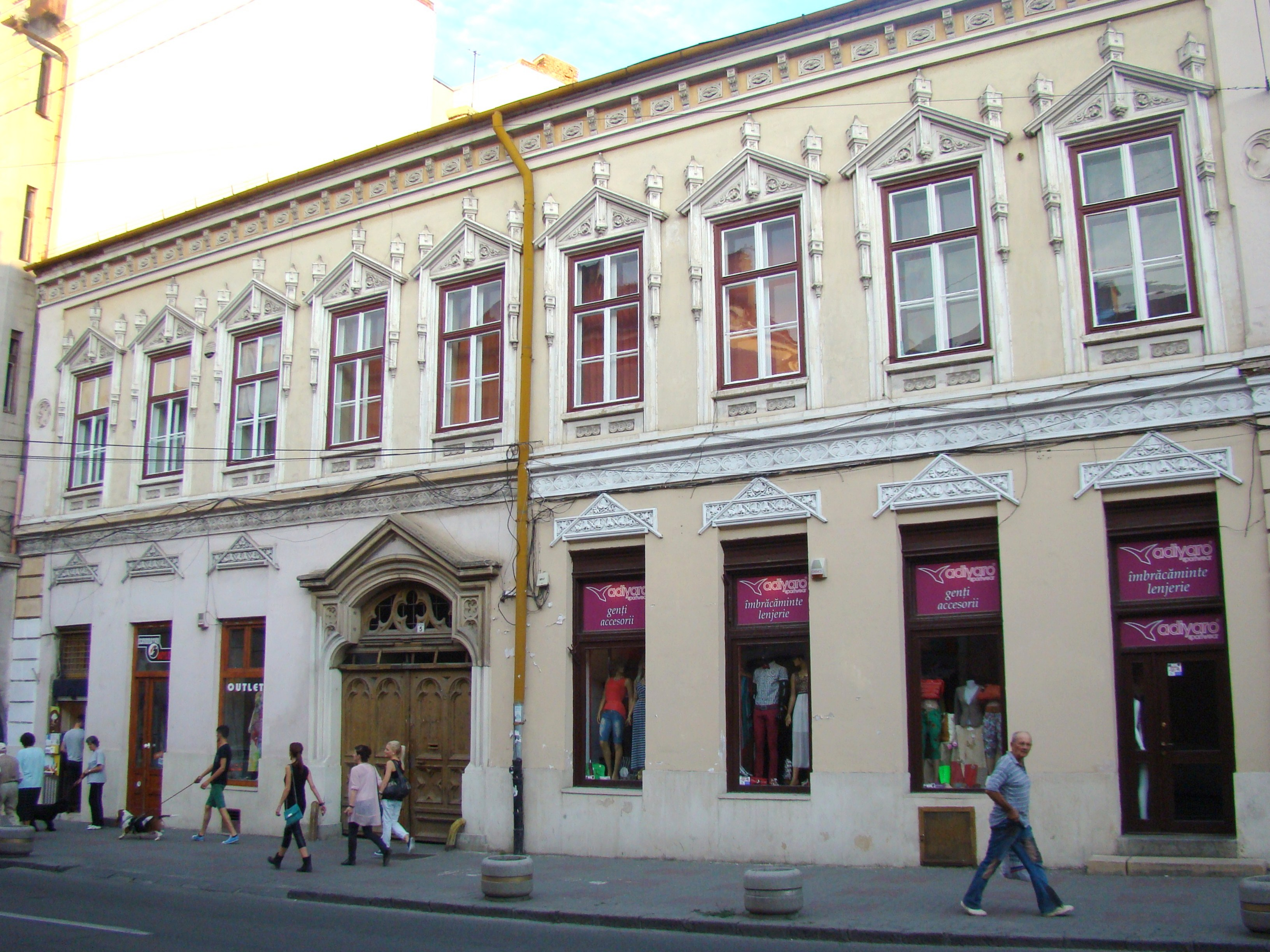 Clădire monument istoric, str.Napoca, nr.5